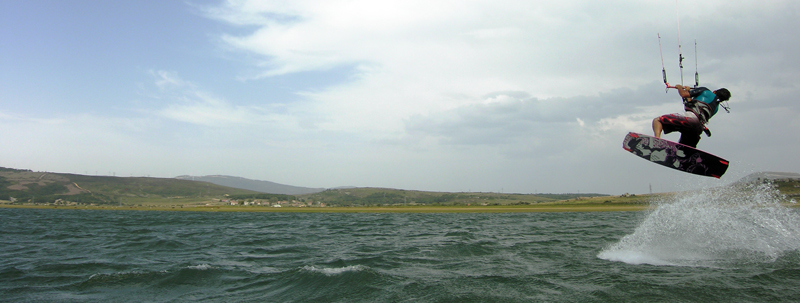 Kitesurf en el Embalse del Ebro.